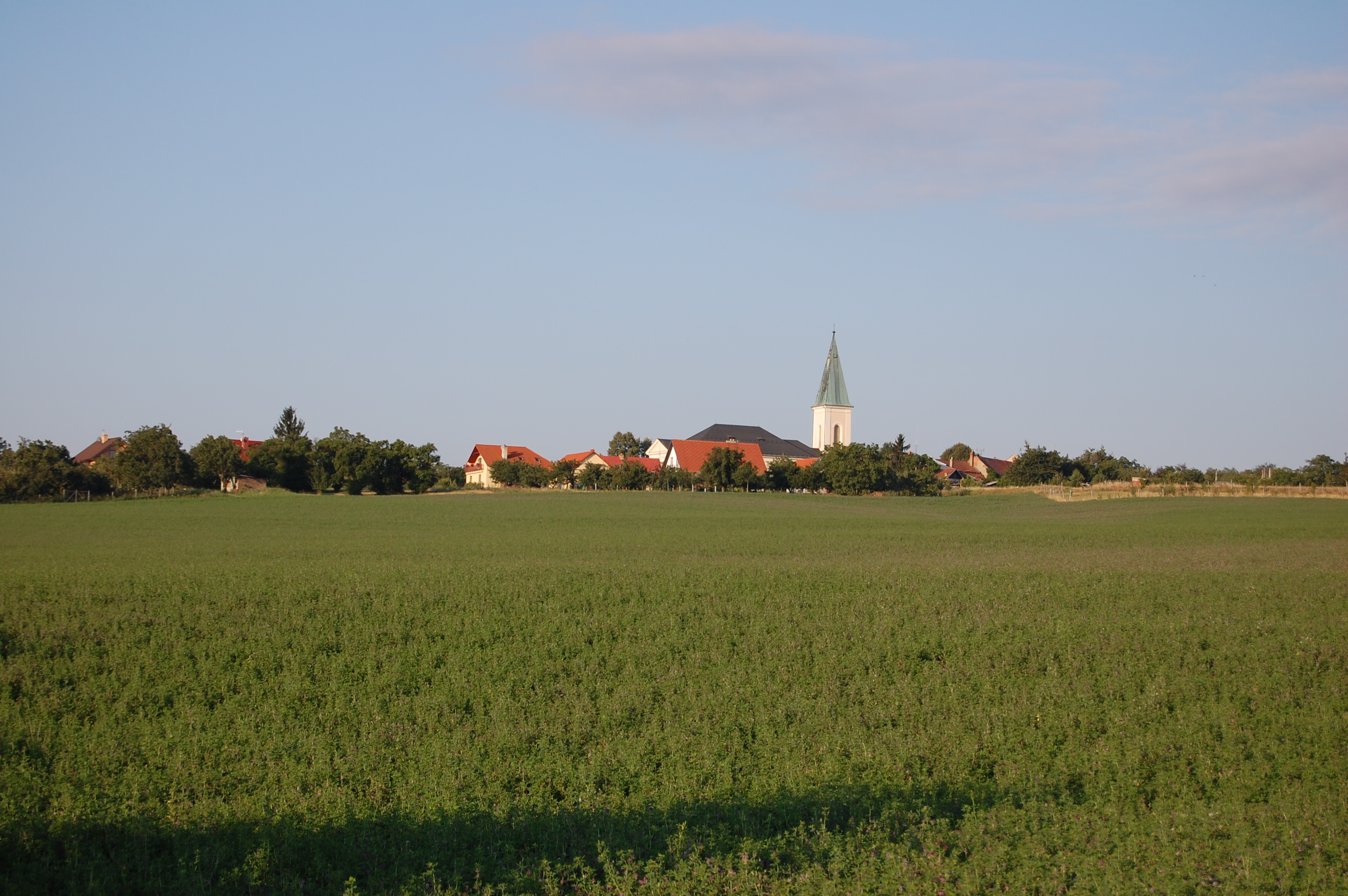 Česky: Panorama obce Ohrozim, okres Prostějov